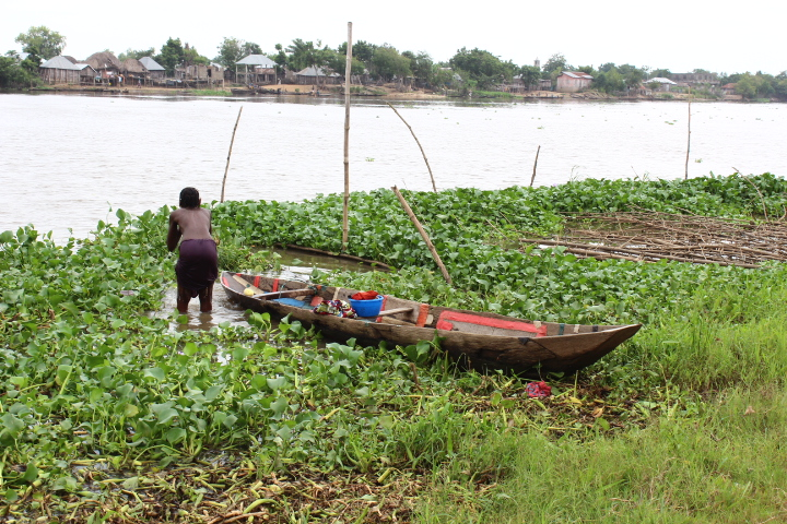 Water hyacinth The Hêtin river in the town of DANGBO.